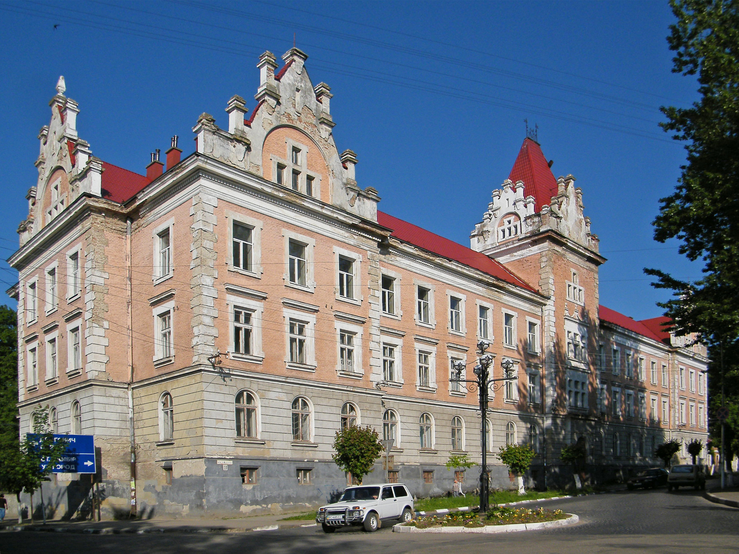 Здание бывшего казначейства